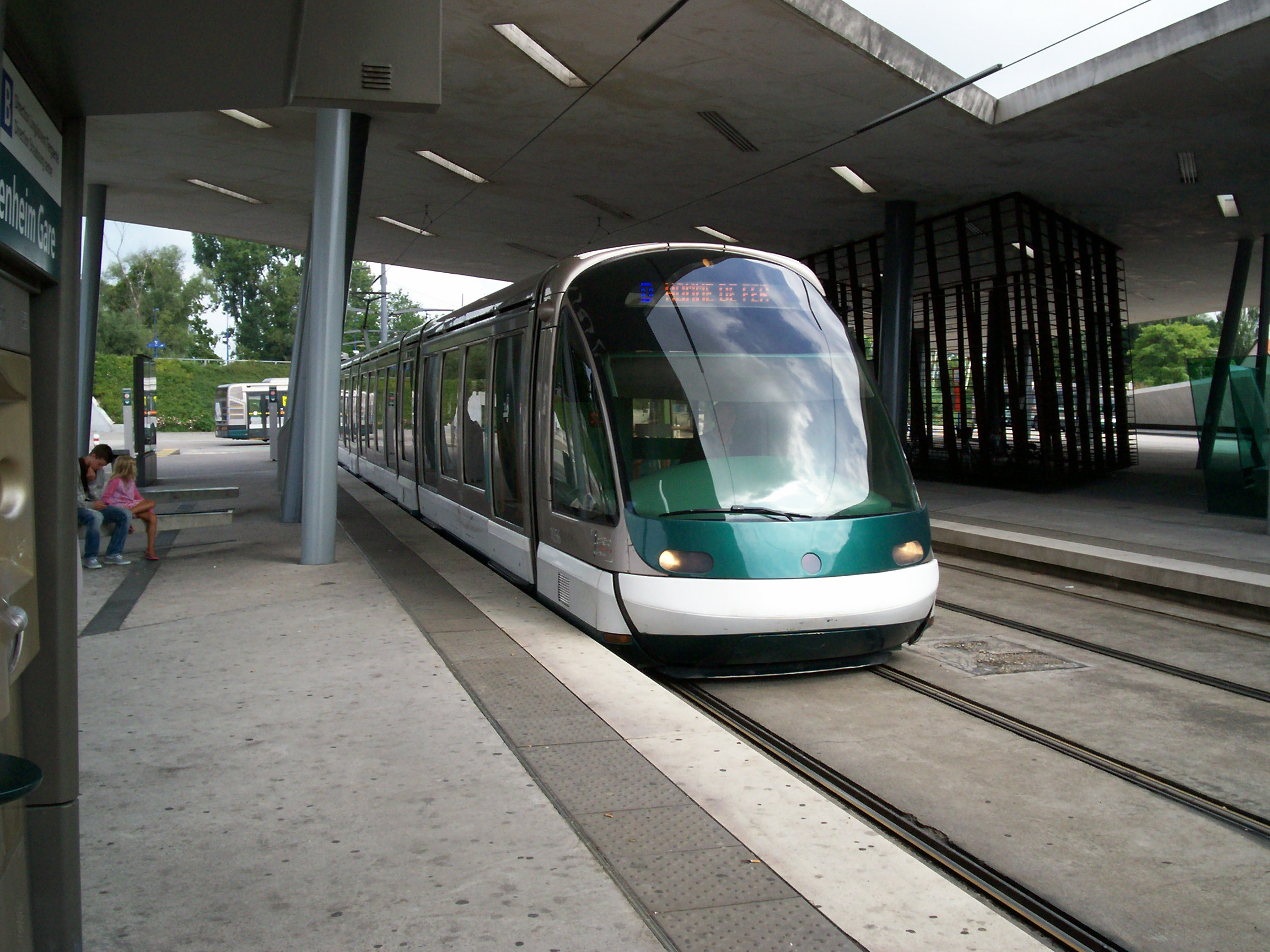 Tramway de Strasbourg